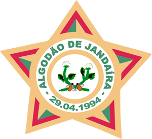 Brasão de Armas do Município de Algodão de Jandaíra no Estado da Paraíba, Brasil.